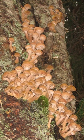 Дерево с опятами на Большом Соловецком острове.